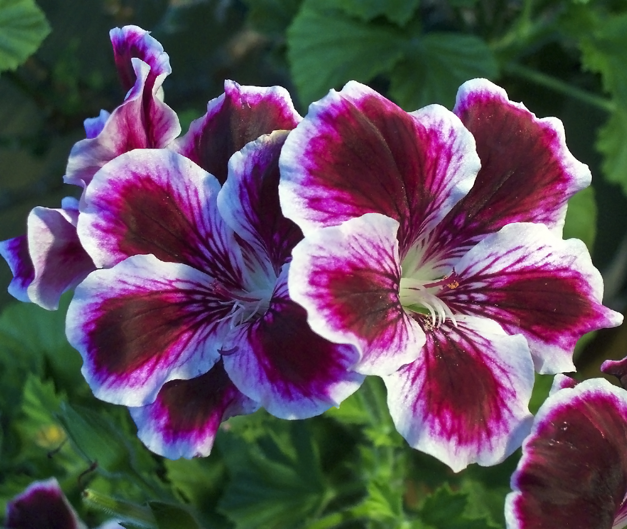 Pelargonium grandiflorum